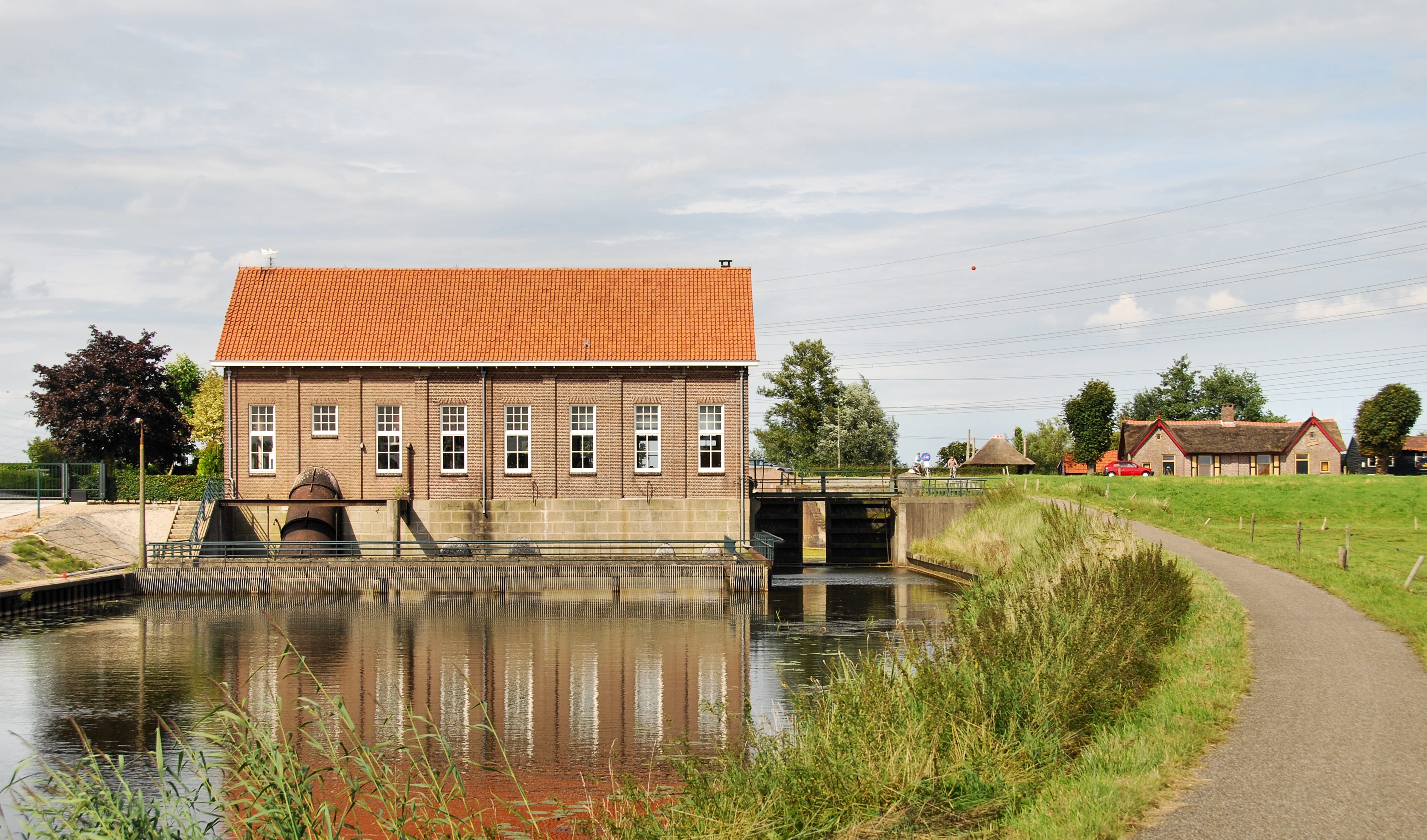 Voormalig stoomgemaal in Wapenveld.